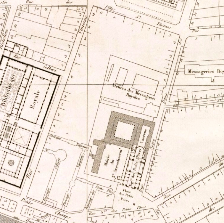 Etat de l'îlot avant le percement de la rue de la Banque. Détail d'une planche de l'atlas de Jacoubet.